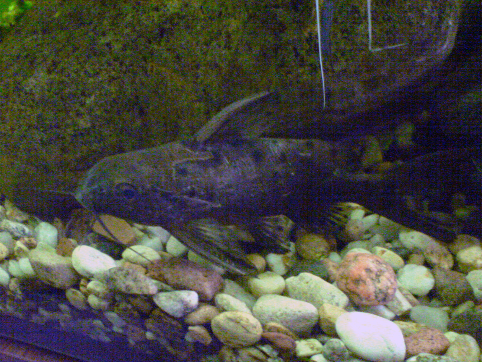 Giętkoząb groszkoplamy